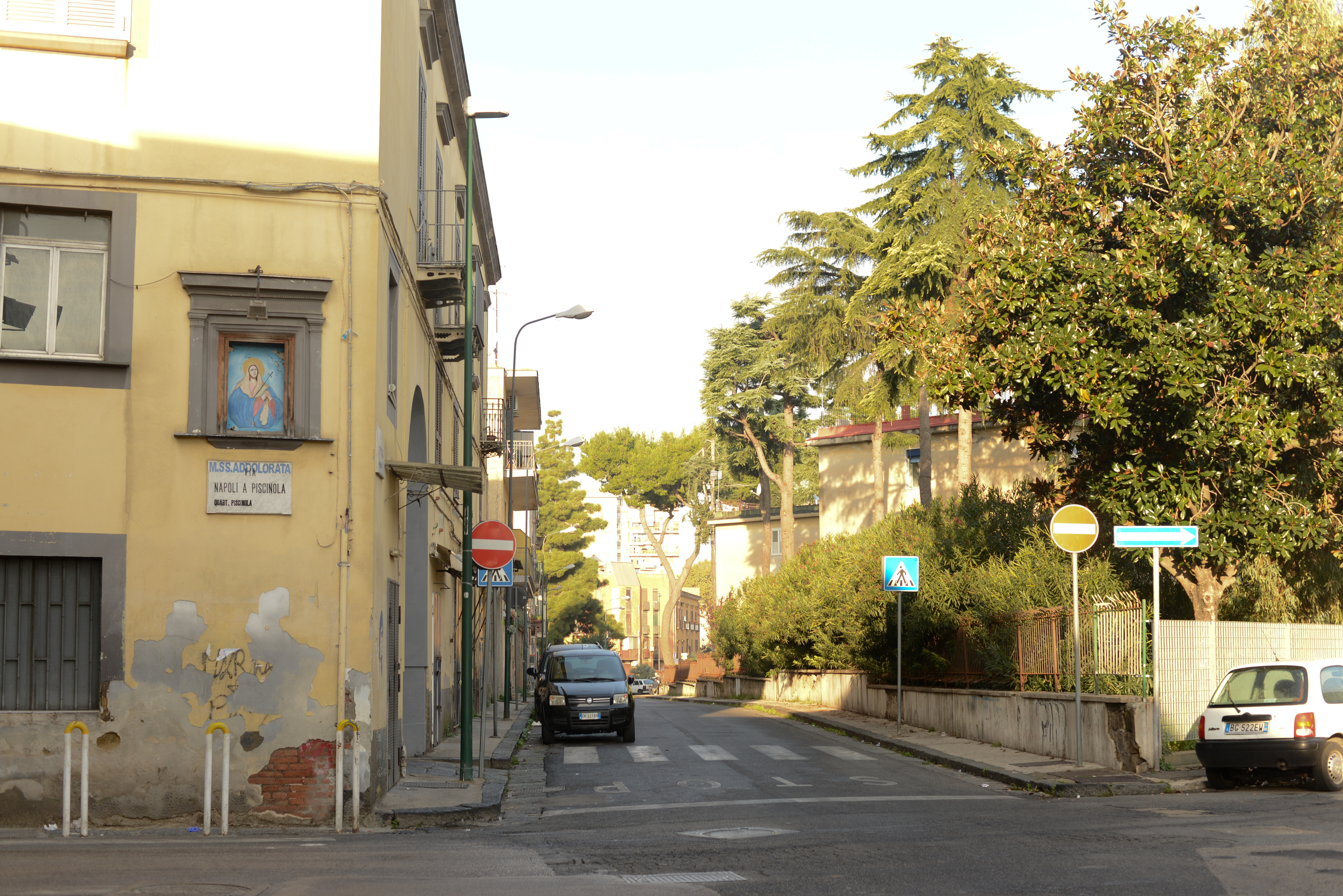 Via Napoli a Piscinola, edicola sacra a SS. Maria Addolorata